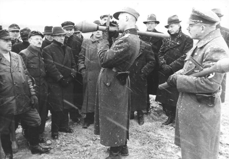 ADN-ZB/Archiv Das faschistische Deutschland im II. Weltkrieg 1939-45 Berlin wird am 1. Februar 1945 zum "Verteidigungsbereich" erklärt. Seit Mitte März werden überall Schießübungen des Volkssturms mit Panzerfäusten durchgeführt. Ein Frontoffizier erläutert den Gebrauch der Waffe. [Herausgabedatum 9.4.1945]